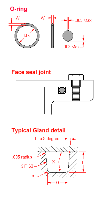 O-ring